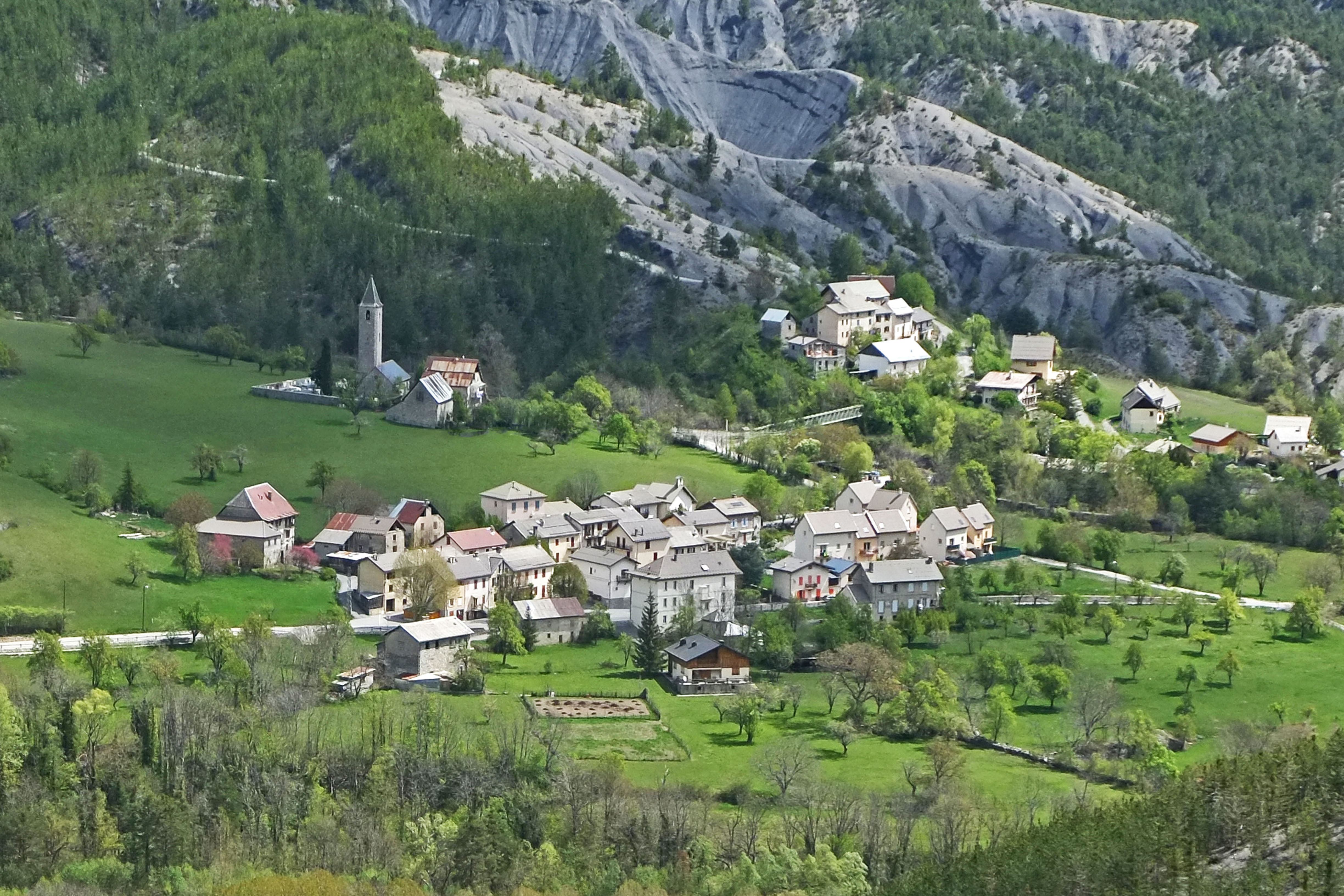 Vue sur le village de Villeneuve-d'Entraunes en grimpant vers Enaux